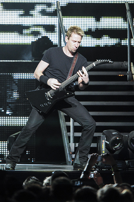 Nickelback @ Perth Arena (17 11 2012)